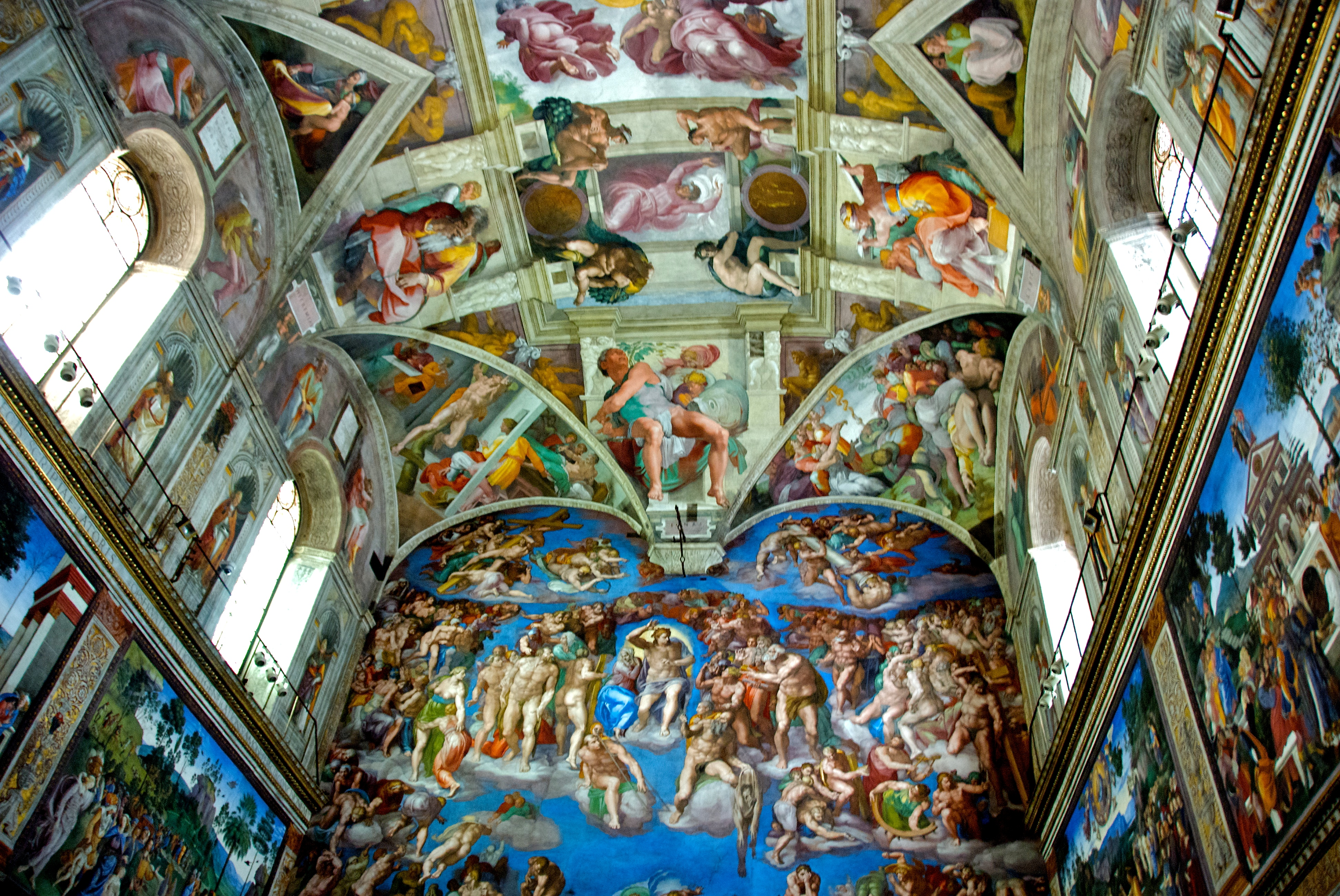 Cappella Sistina (Sistine Chapel)